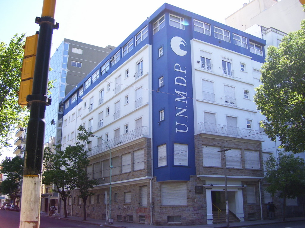 Edificio del Rectorado de la Universidad Nacional de Mar del Plata.